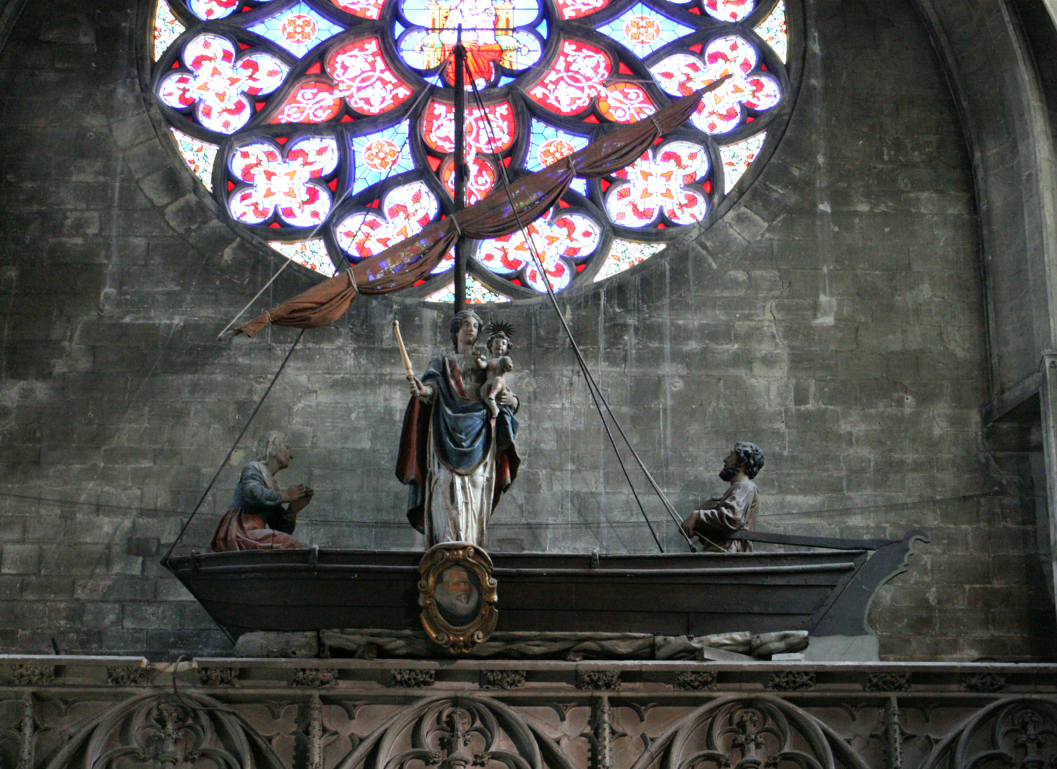 Eglise Notre-Dame du Sablon, Bruxelles (Belgique). Bras droit du transept: barque en bois polychrome du XVIIE siècle qui rappelle l'épisode du transfert de la statue de la vierge enlevée à Anvers par Béatrice Soetkens et transportée au Sablon en 1348. Portait du donateur dans le médaillon.